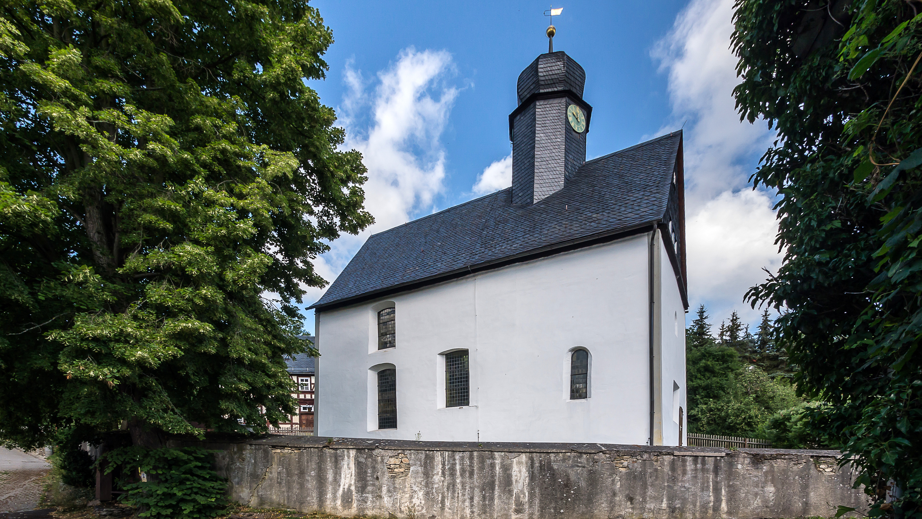 Oberloquitz Kirche mit Ausstattung